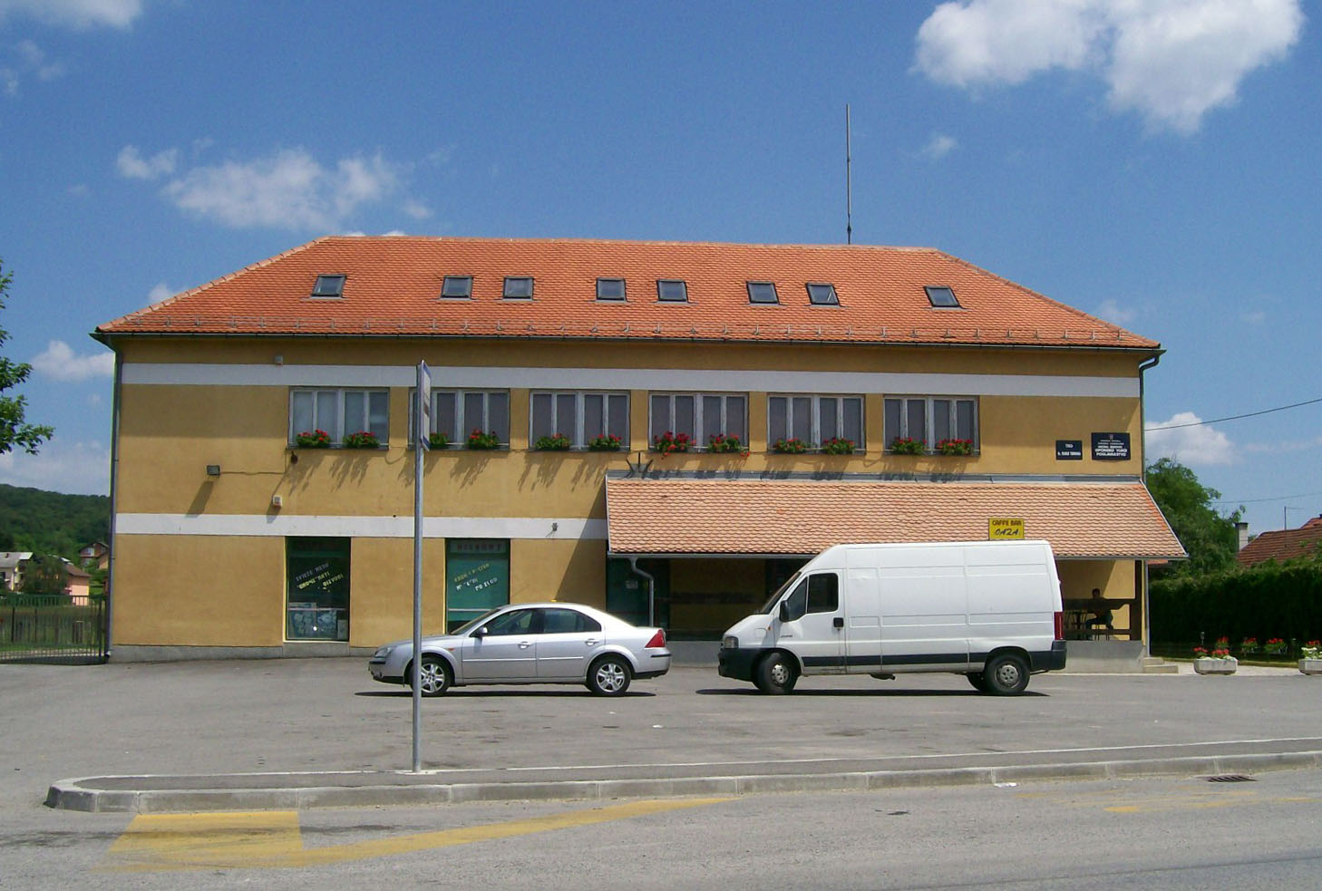 Zgrada općine Brdovec